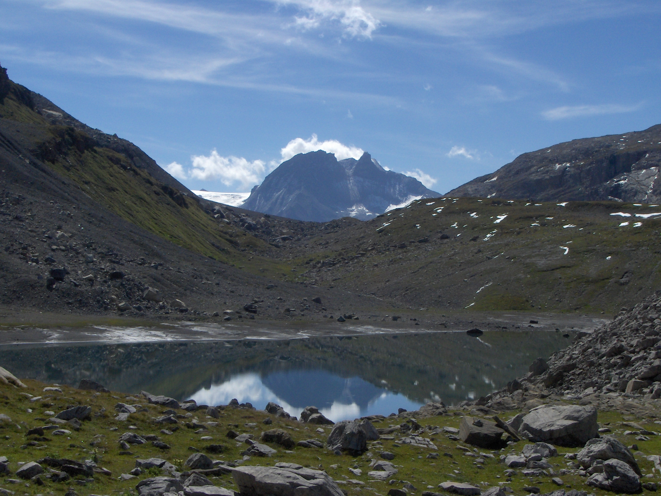 Un des nombreux lacs du massif de la Vanoise.